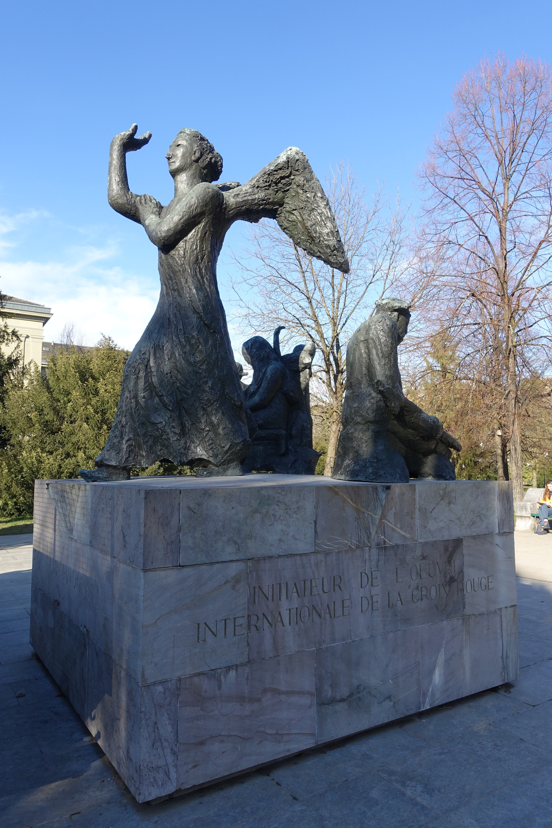 Monument Henry Dunant dans le parc des Bastions à Genève. Offert par le "Comité genevois pour un monument Henry Dunant" à la Ville de Genève, ville natale d’Henry Dunant. Inauguré le le 8 mai 1963, jour anniversaire de sa naissance. L'année 1963 marque également la célébration du Centenaire de la Croix-Rouge. Le monument montre un ange qui étend son bras protecteur pour secourir son prochain, prisonnier, blessé ou affamé. Sculpteur Jakob_Probst(1880-1966).